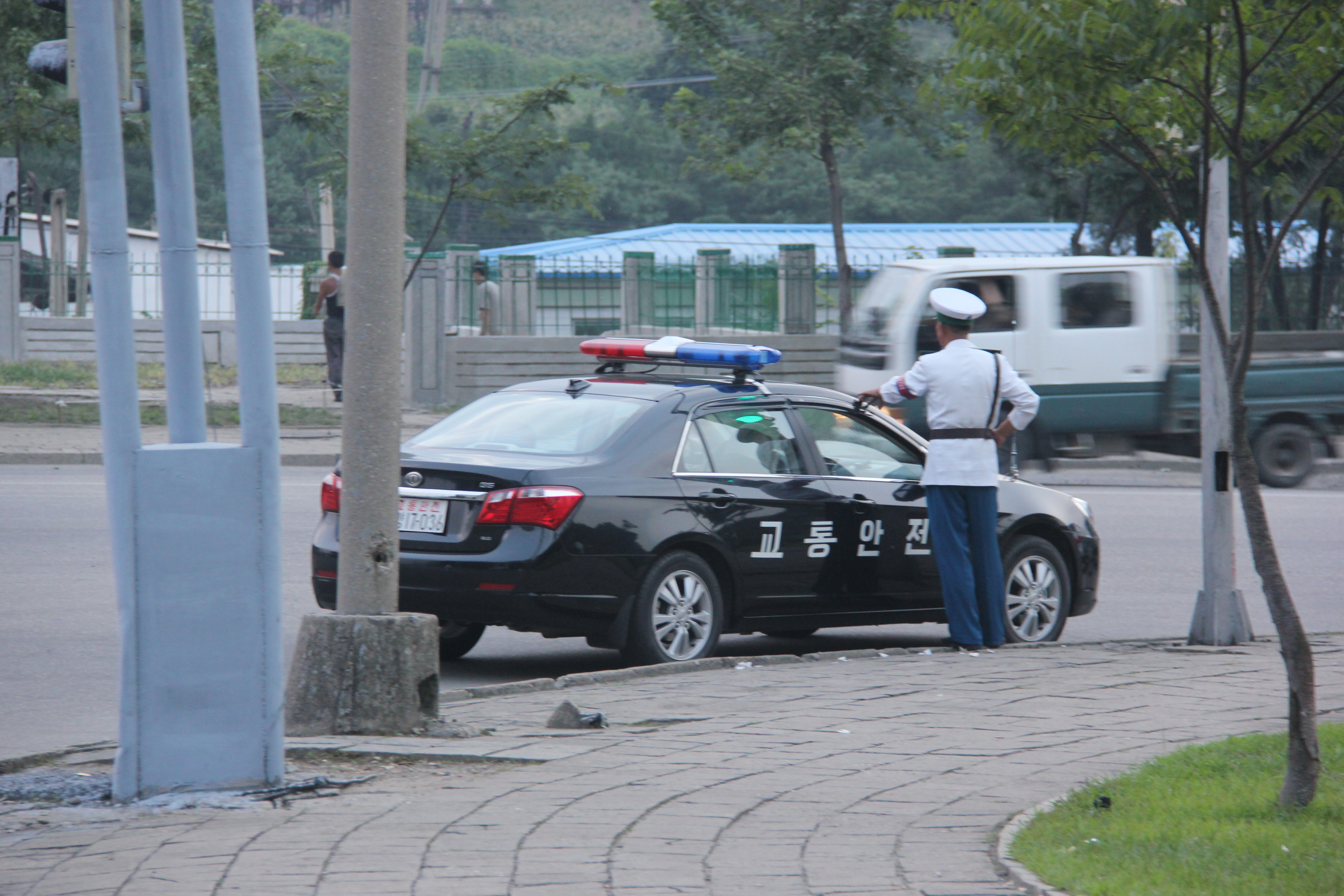 A police car!